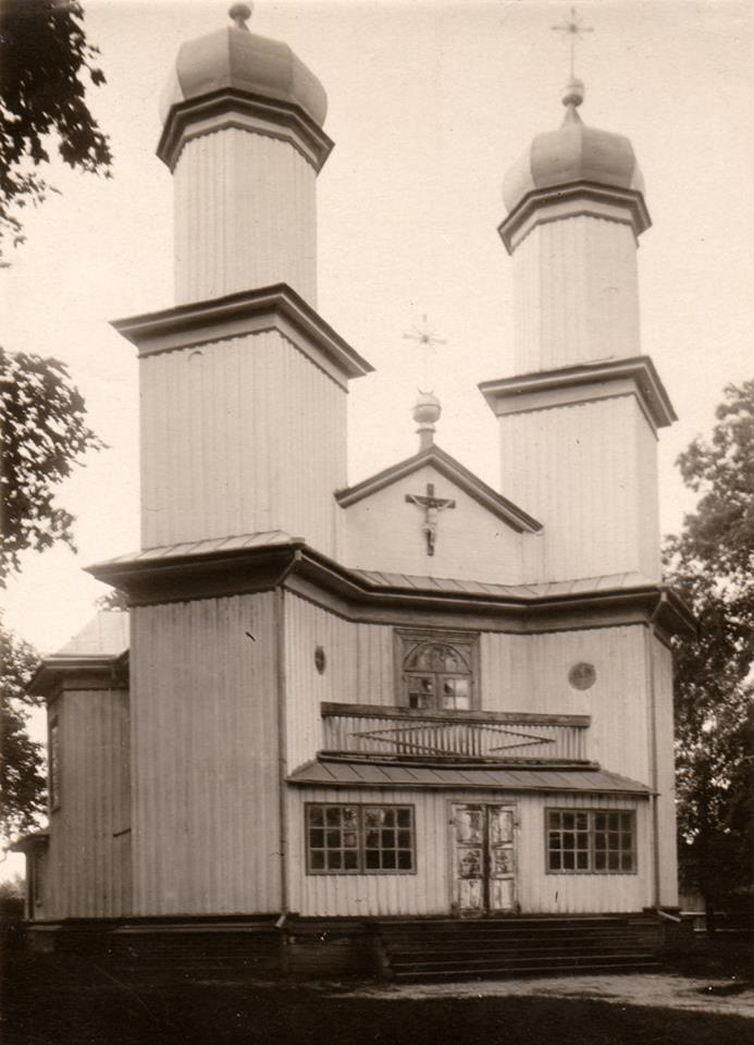 Kościół katolicki we wsi Chabno / Chabne